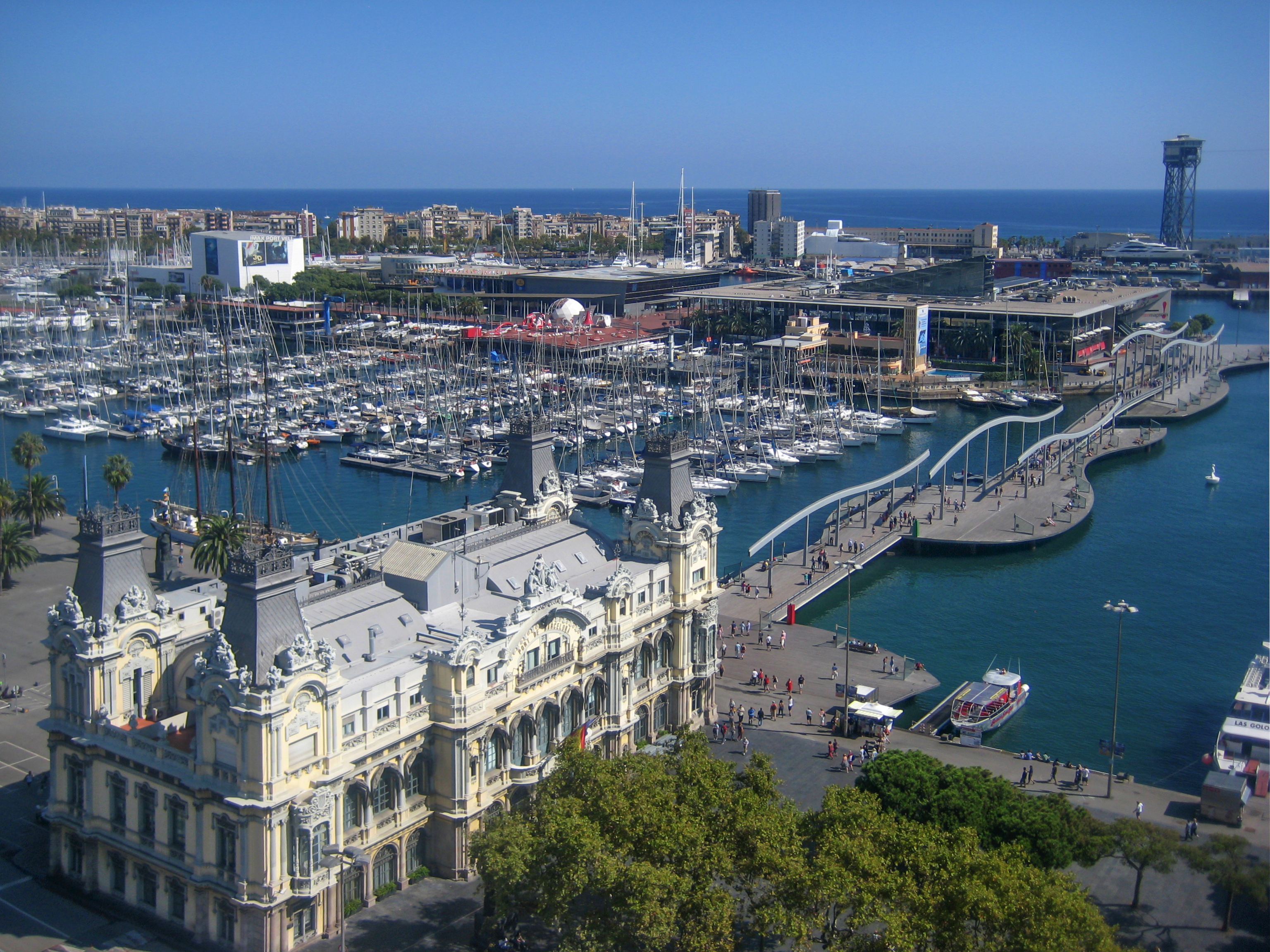 Барселона, вид на Морскую Рамблу с колонны Колумба